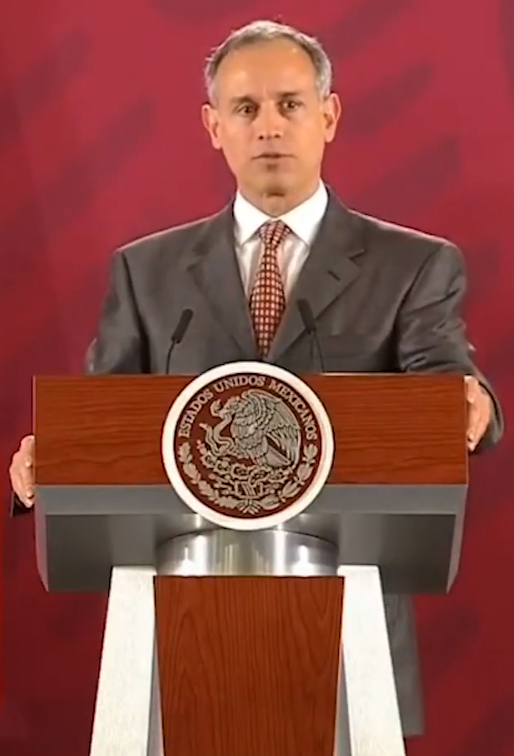 López Gattel en una conferencia (circa 1:03)